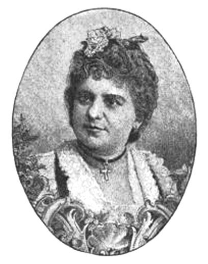 Josefine Gallmeyer (1838-1884). In: Gute Kameraden. Von Peter Rosegger. Wien, Pest, Leipzig, 1893. S. 211